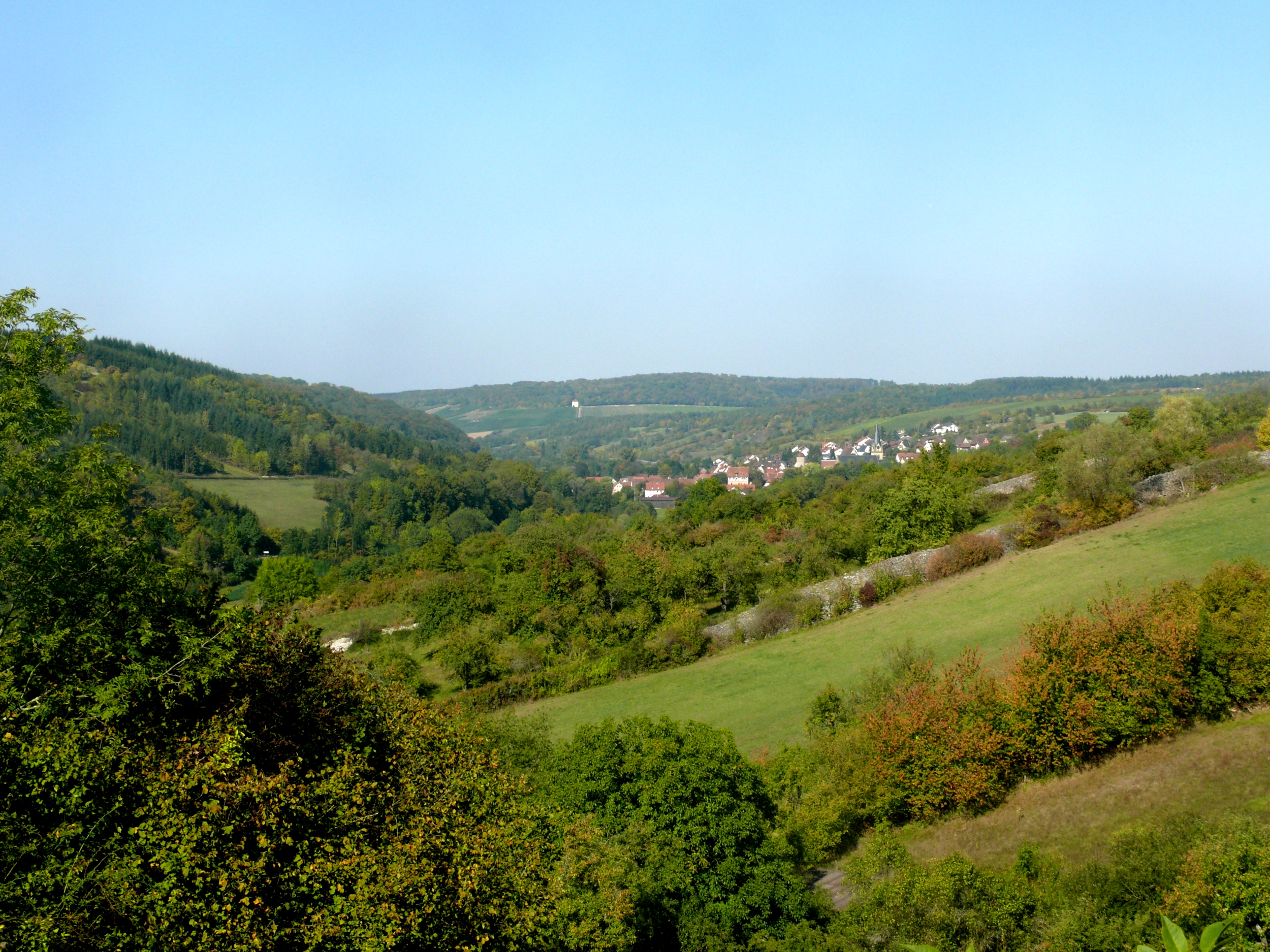 Blick ins Vorbachtal Richtung Norden. Laudenbach in der Bildmitte, im Hintergrund der Weikersheimer Karlsberg.